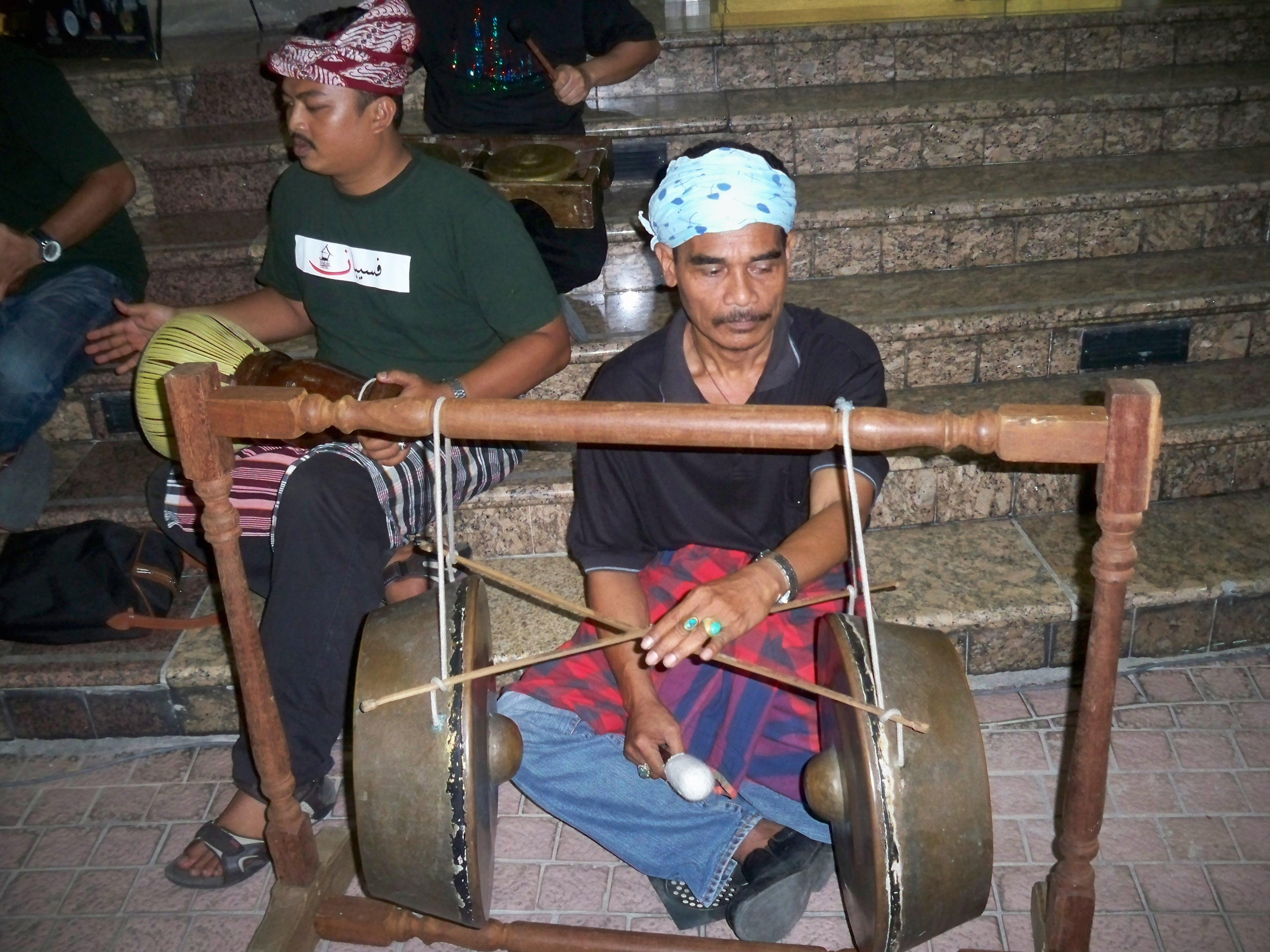 Музыкант, игоающий на гонге (Малайзия)